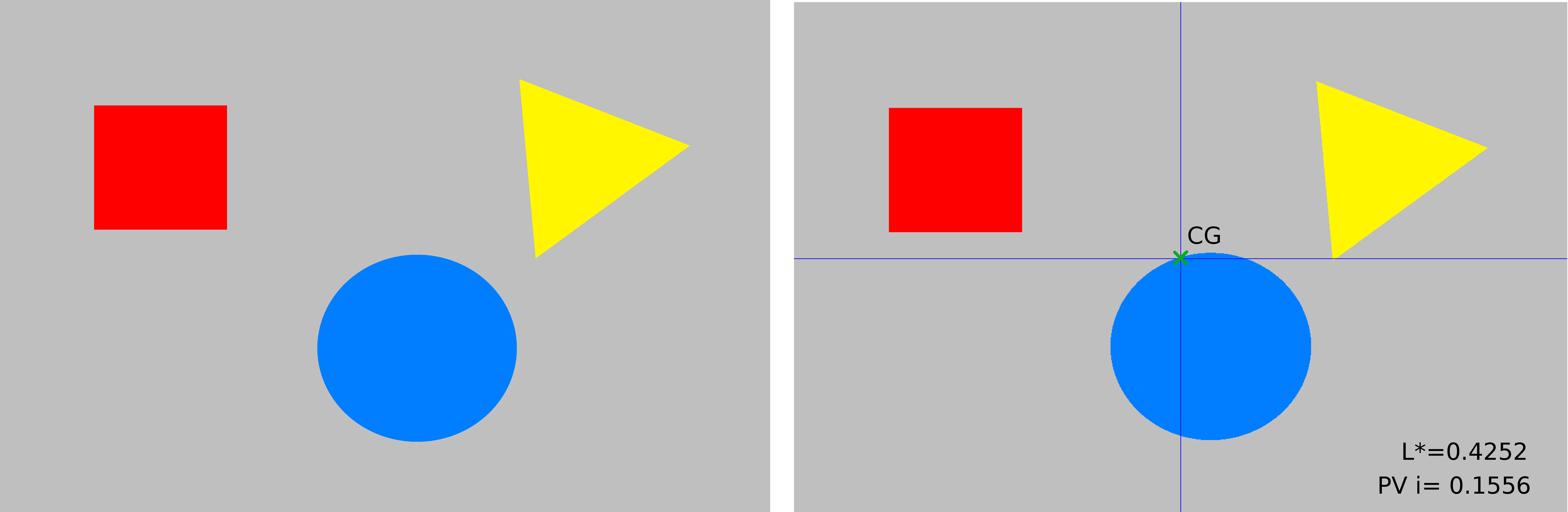 COMPOSICION DE UNA IMAGEN